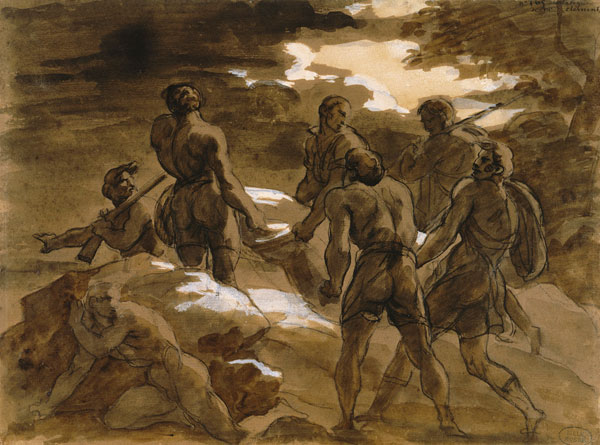 Die Mörder tragen den Leichnam von Fualdès zum Aveyron; Sepia-Zeichnung 21,5 × 28,7 cm; Paris, Musée des Beaux-Arts